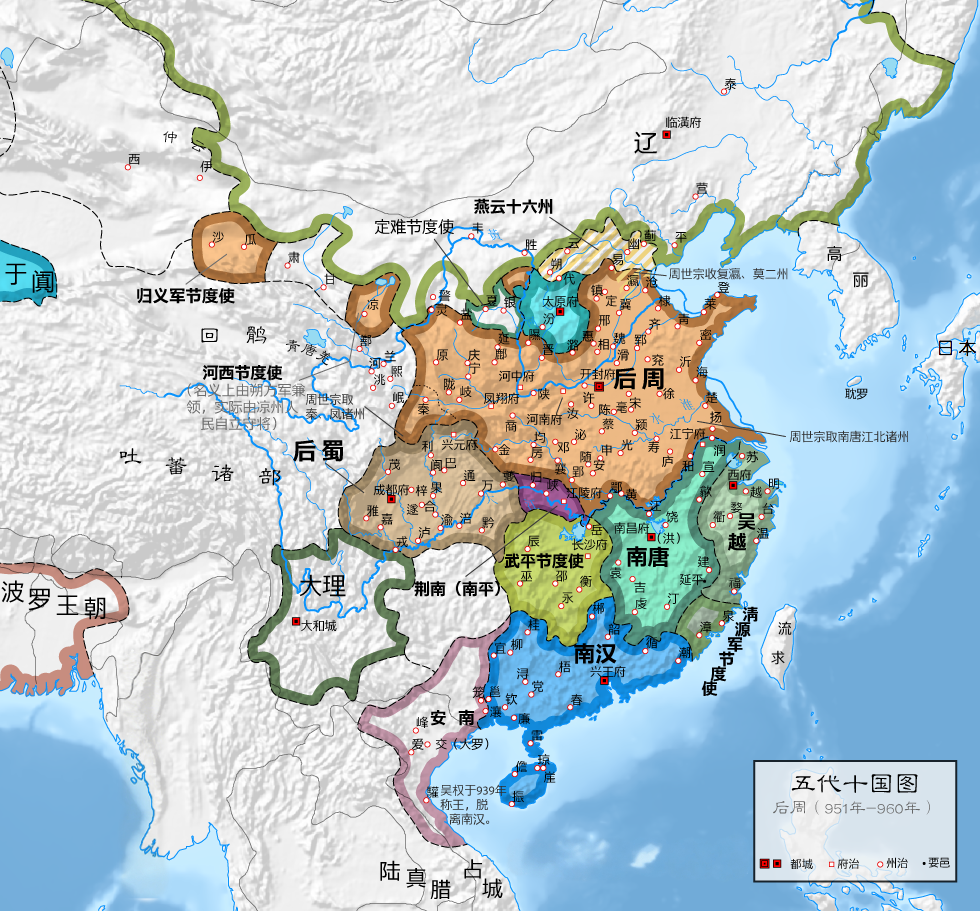 五代